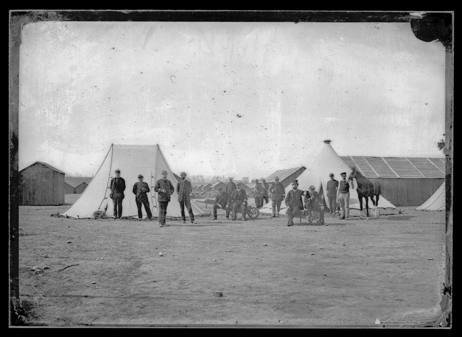 Camp militaire du Polygone, avenue de Grande-Bretagne. Février 1871. Vue d'un groupe de soldats posant devant les tentes et les bâtiments du camp. A droite un civil portant un haut-de-forme ; à gauche un cheval.